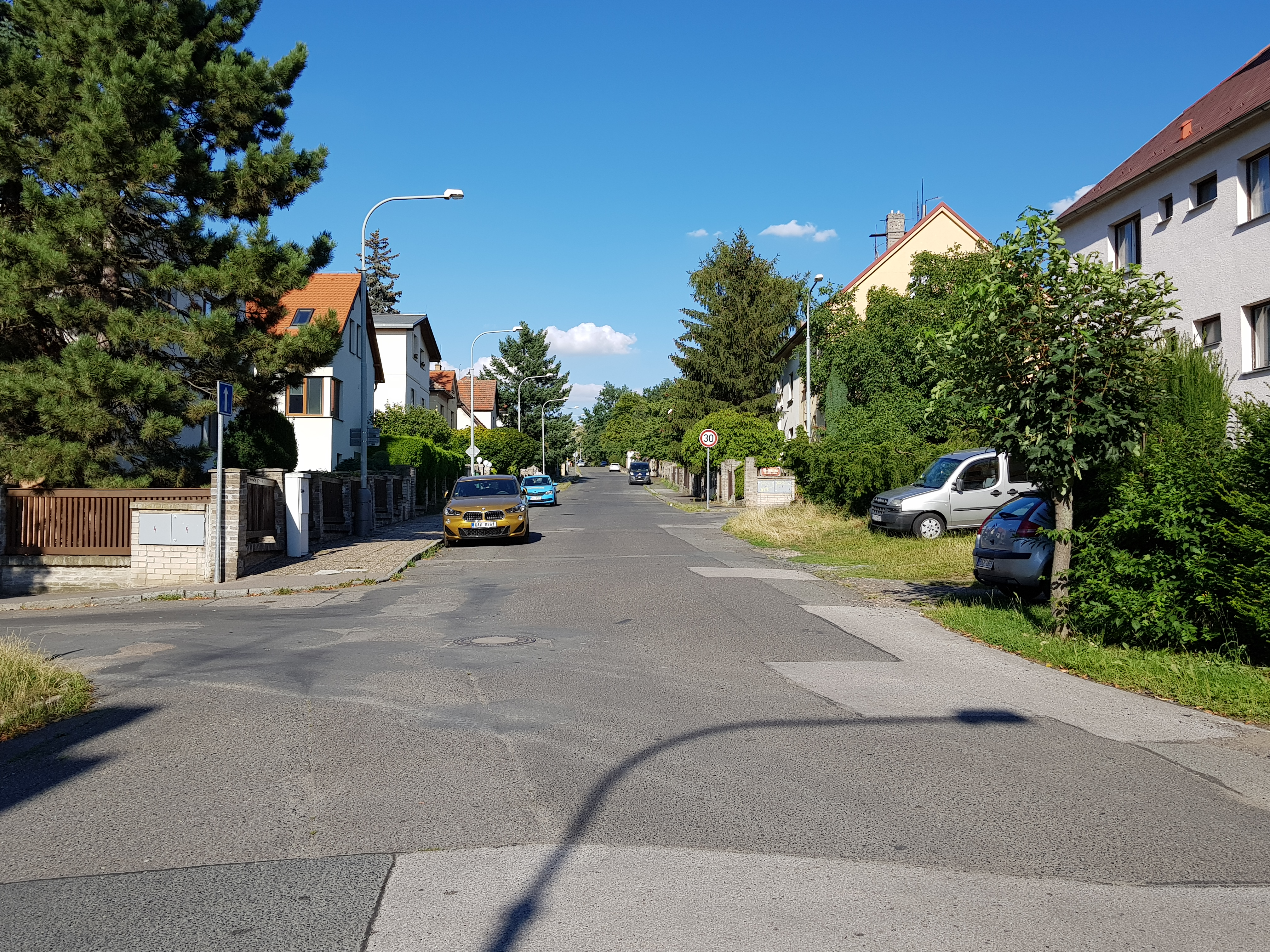 Ulice Vaňkova, Praha 14-Hloubětín, pohled od ulice Čertouská na východ